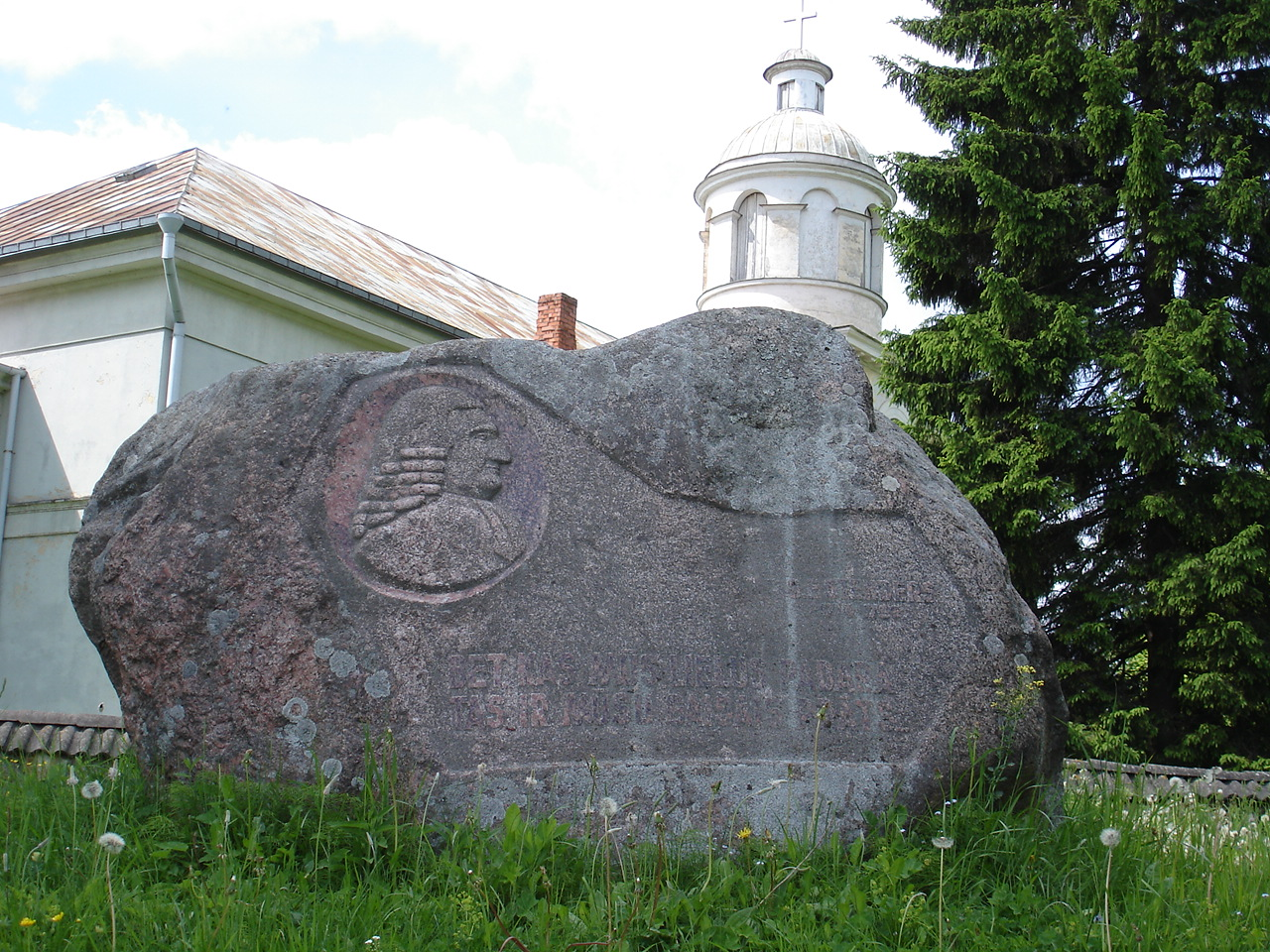 la pierre commémorative de StendersLatviešu: Vecā Stendera piemiņas akmens